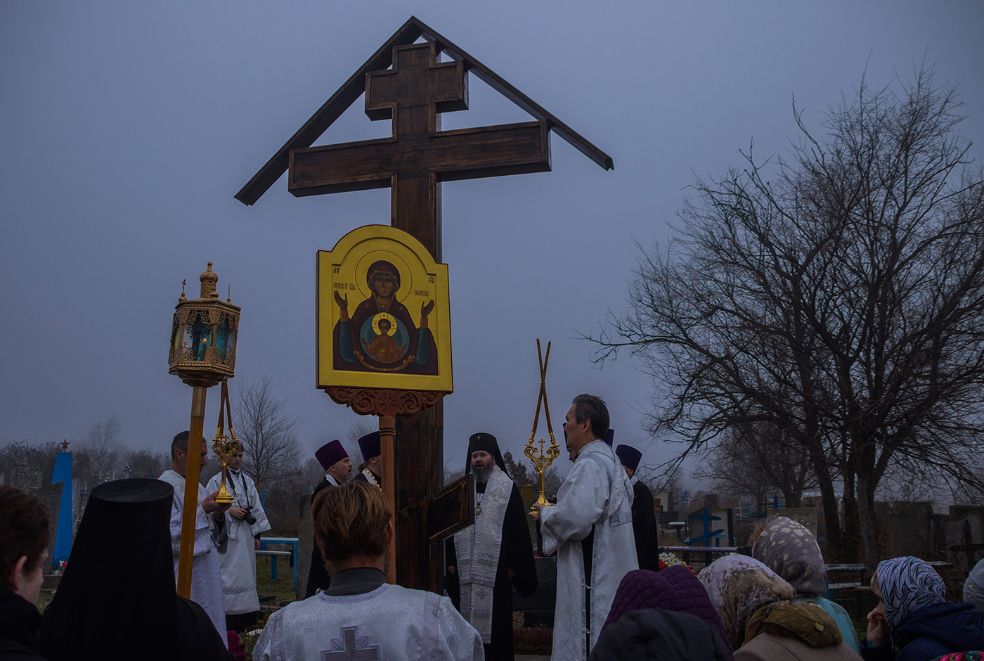 Крест, установленный к 150-летию Православия в Элисте в память усопших священников и мирян, молитвами и трудами которых утверждалась православная вера на калмыцкой земле.